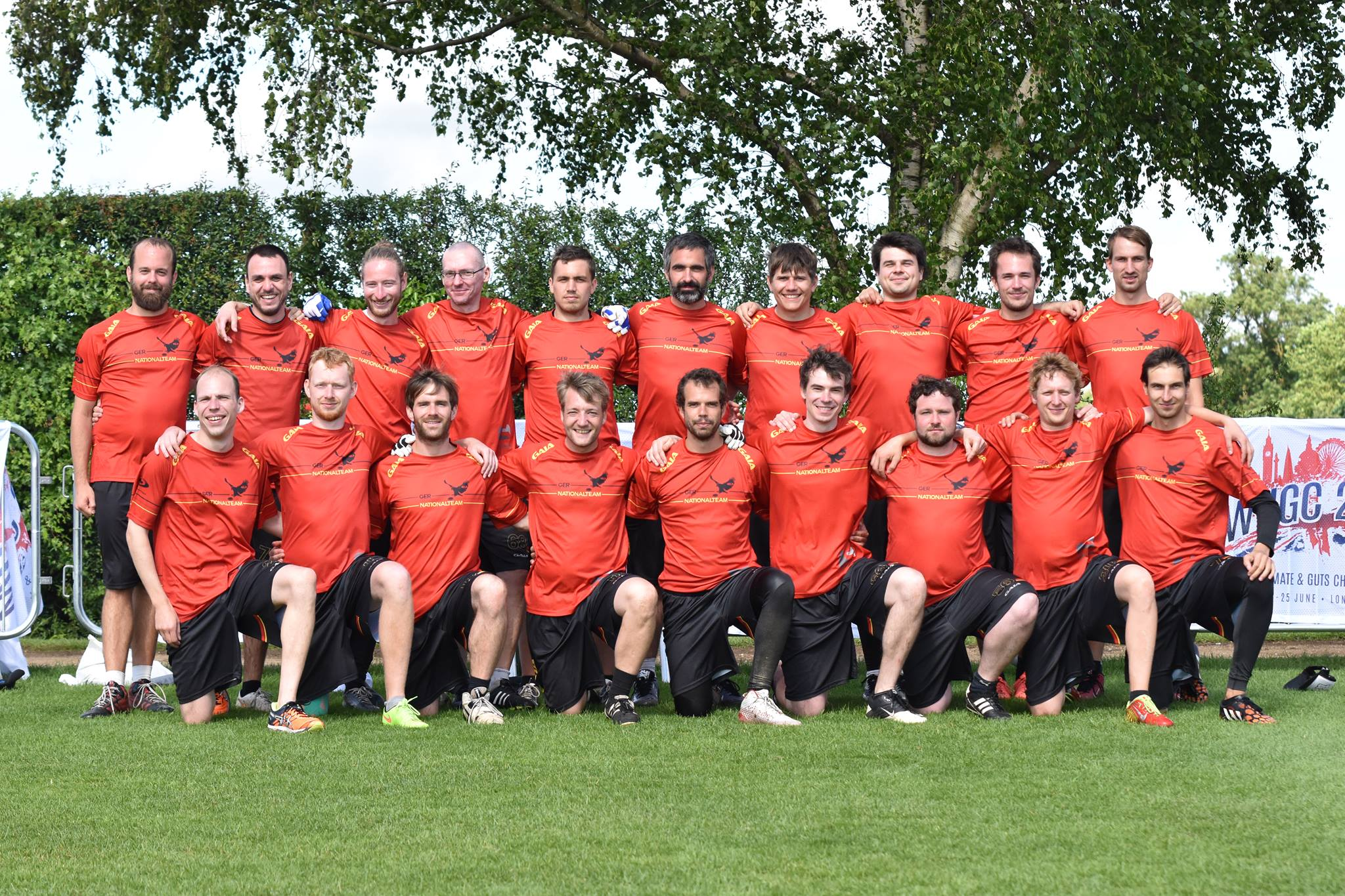 Mannschaftsfoto der deutschen Guts-Nationalmannschaft auf der Weltmeisterschaft 2016 in London, UK.